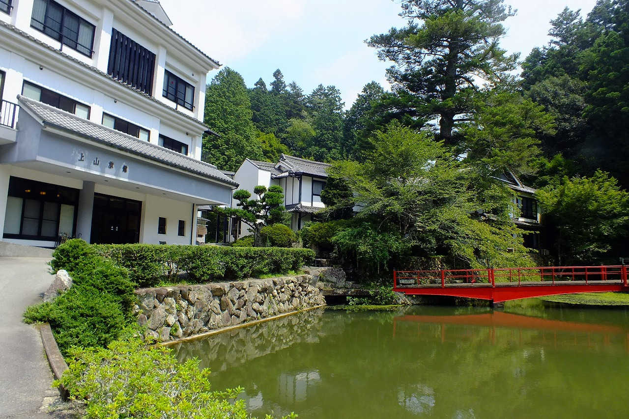 2015-10-01 Sioda-Onsen Ueyama Ryokan（湯元上山旅館）